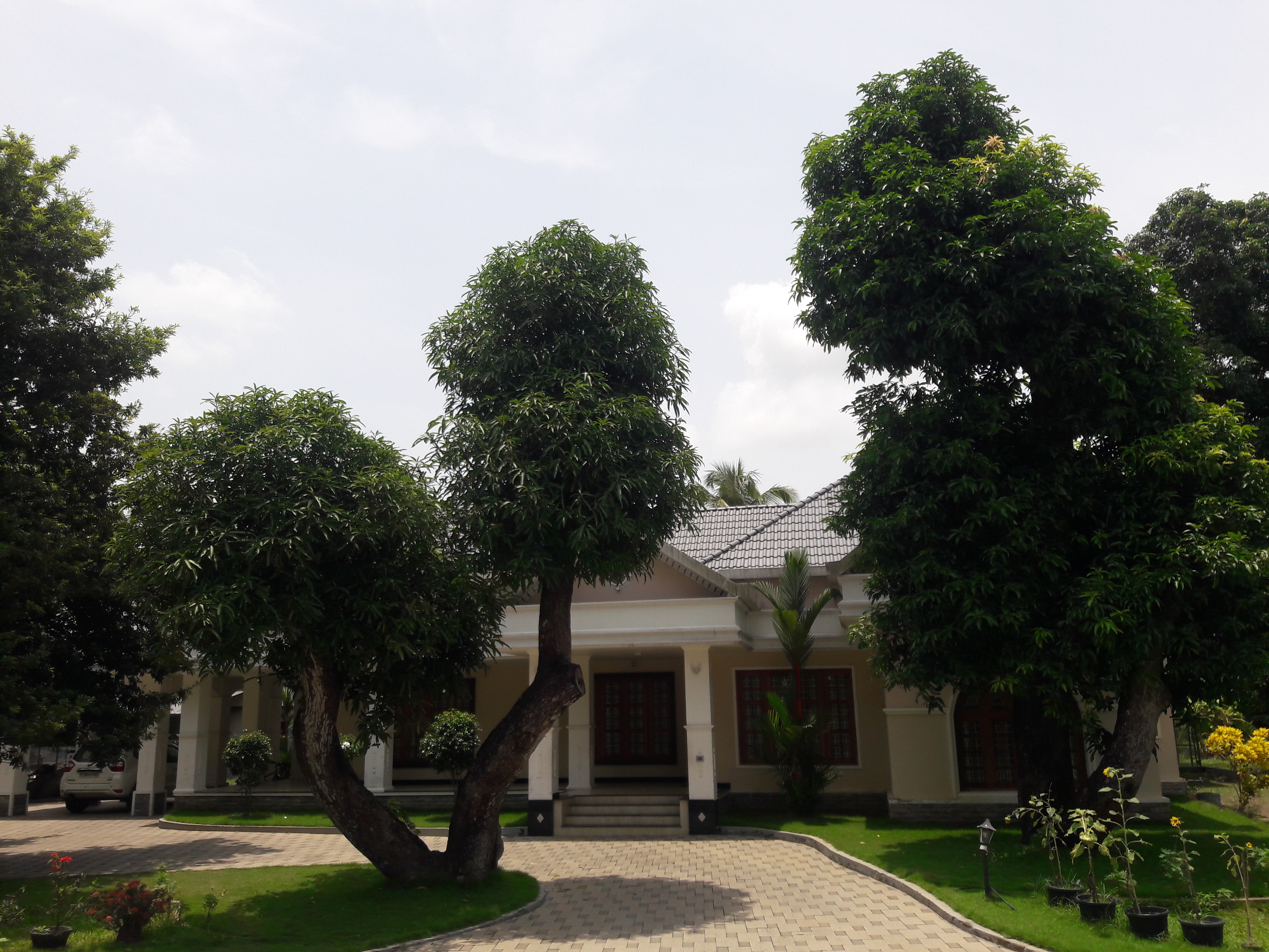 മരങ്ങളിലെ പുനർ യൗവന പ്രക്രിയ ചെയ്ത ശേഷം ഇലകള്‍ വരുന്ന മാവ്.